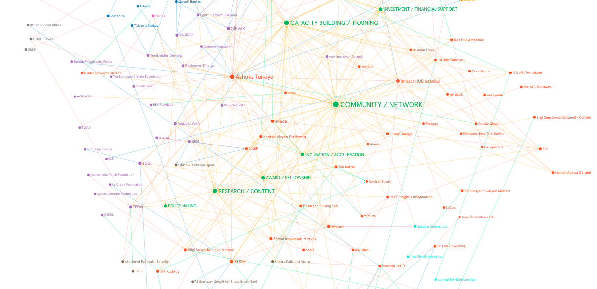 imece ashoka ağ haritası